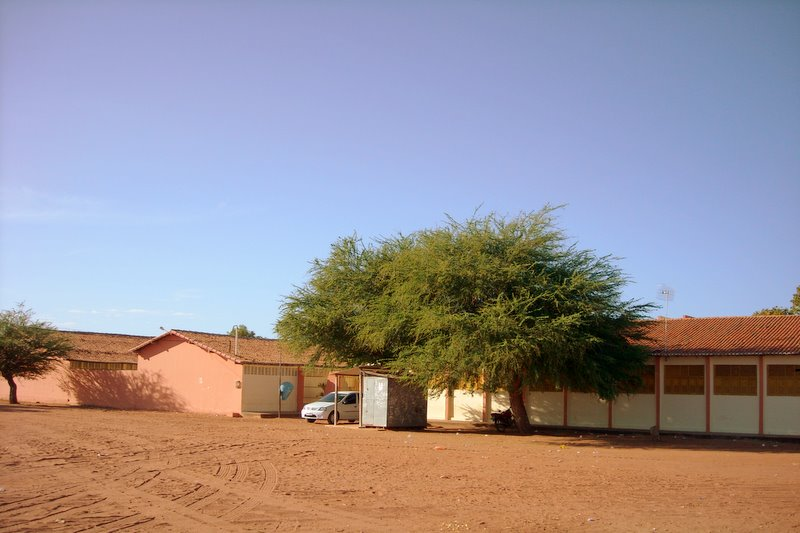 Escola Estadual Padre José de Anchieta